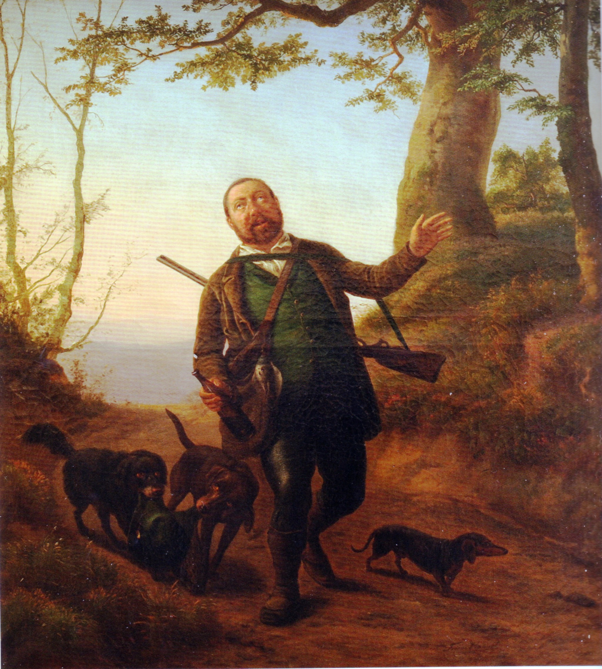 Friedrich Happel: "Fröhlicher Jäger kehrt von der Jagd heim," um 1850, Öl auf Leinwand, 90x81,5 cm, heute im Besitz des Westfälischen Schieferbergbau- und Heimatmuseums Schmallenberg-Holthausen